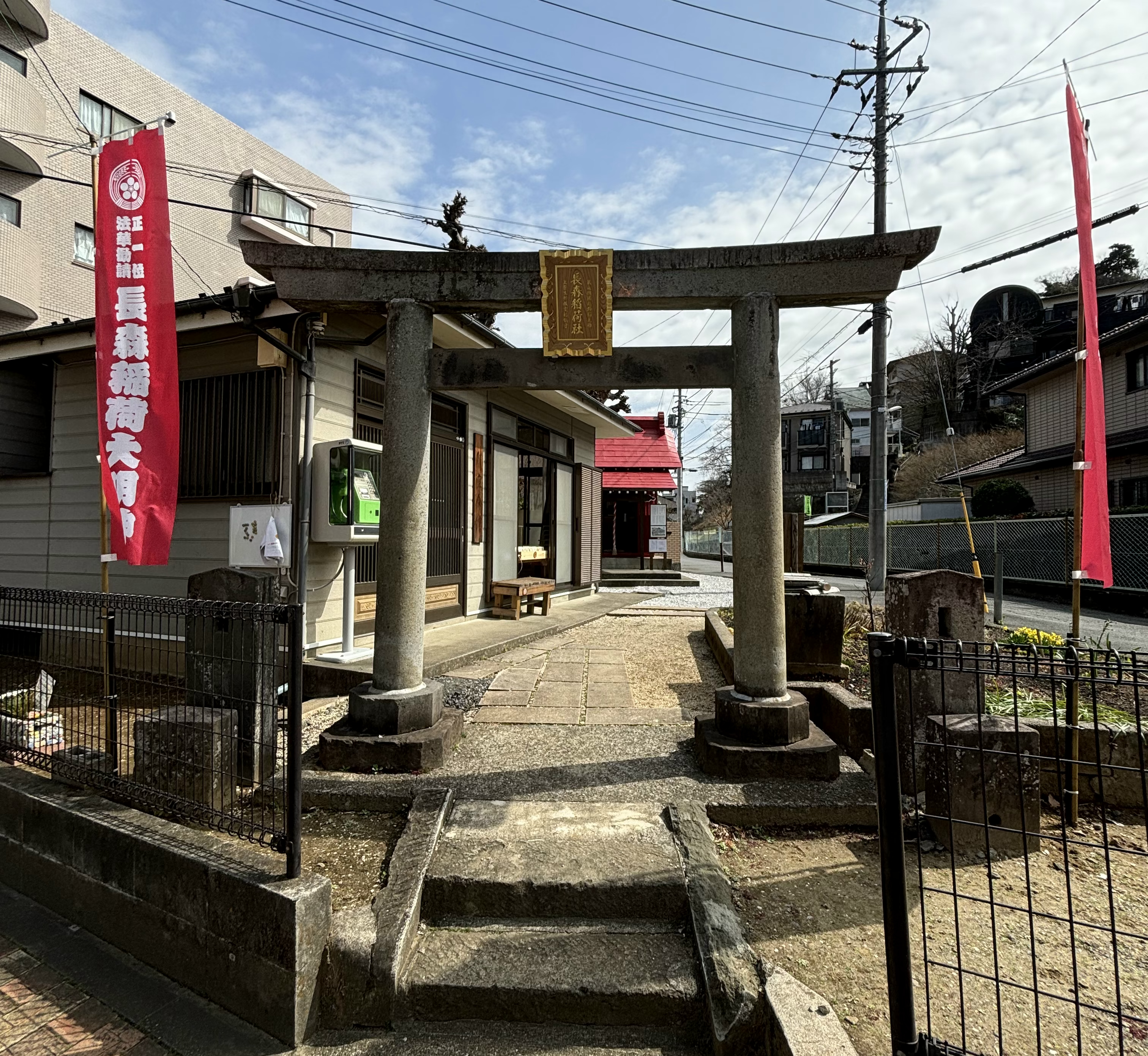 鳥居